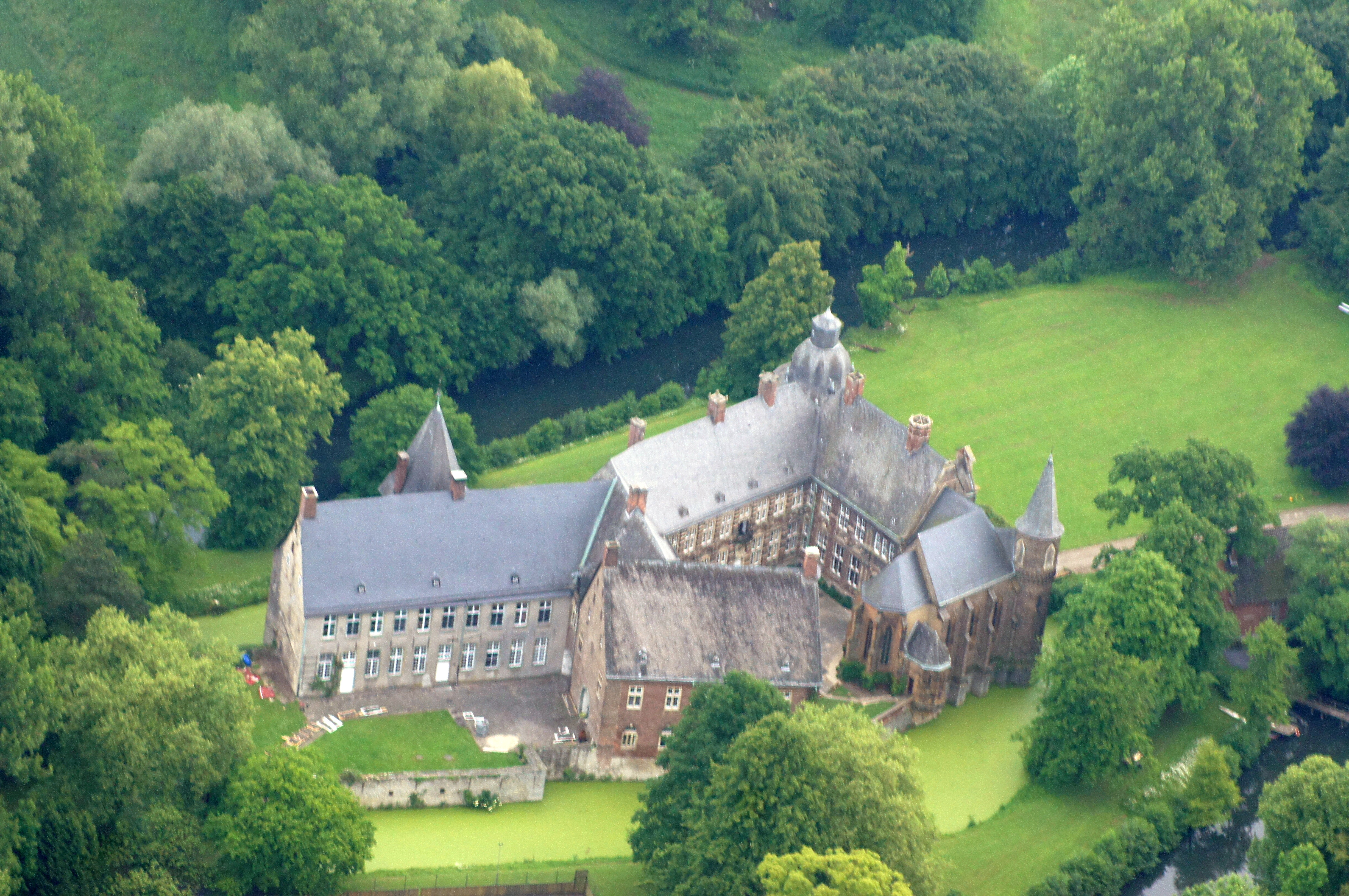 Haus Assen ist ein Wasserschloss in Lippborg, Gemeinde Lippetal, Kreis Soest, Nordrhein-Westfalen. Das Bild entstand während des Münsterland-Fotoflugs am 1. Juni 2014. Hinweis: Die Aufnahme wurde aus dem Flugzeug durch eine Glasscheibe hindurch fotografiert.